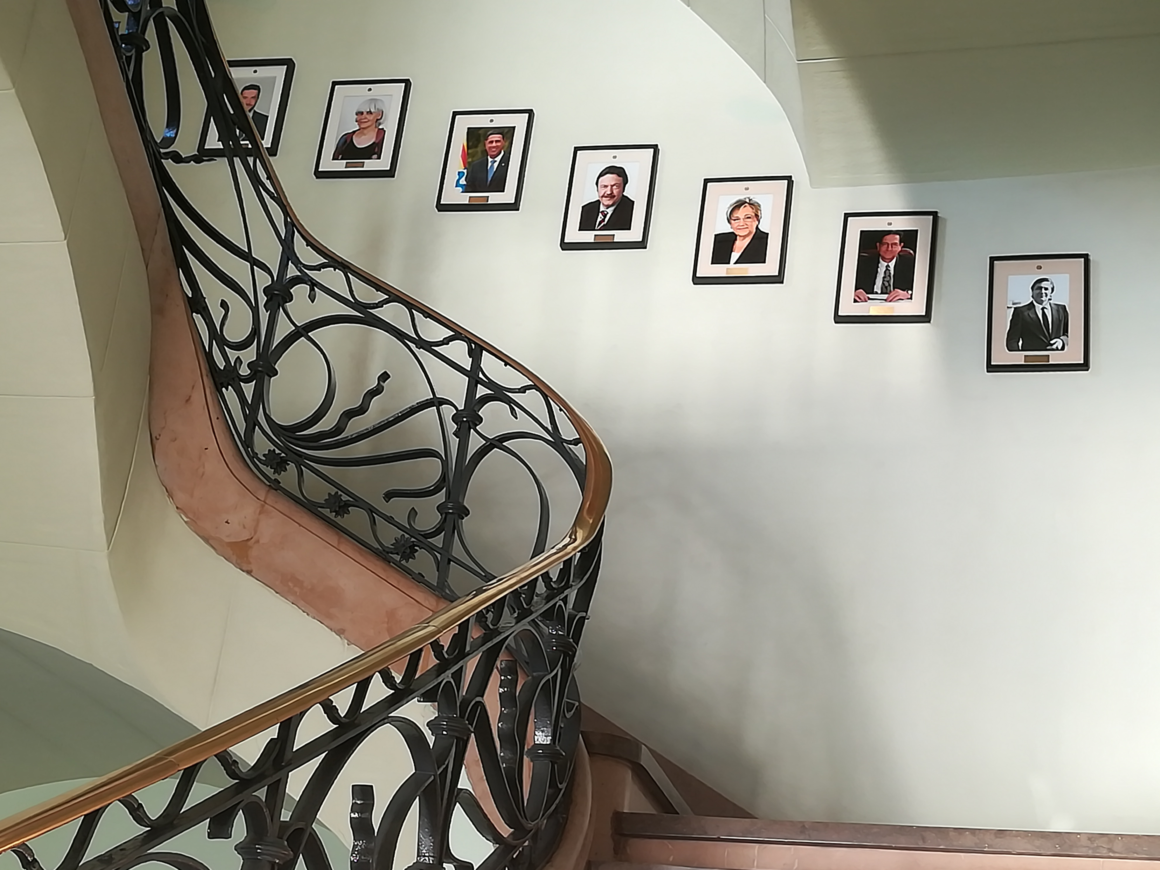 Casa Consistorial (Badalona)